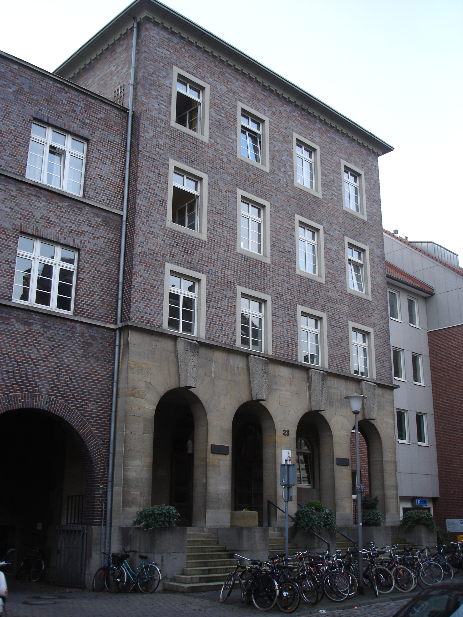 Deutsches Studentenwohnheim in Münster, Westphalia, Germany